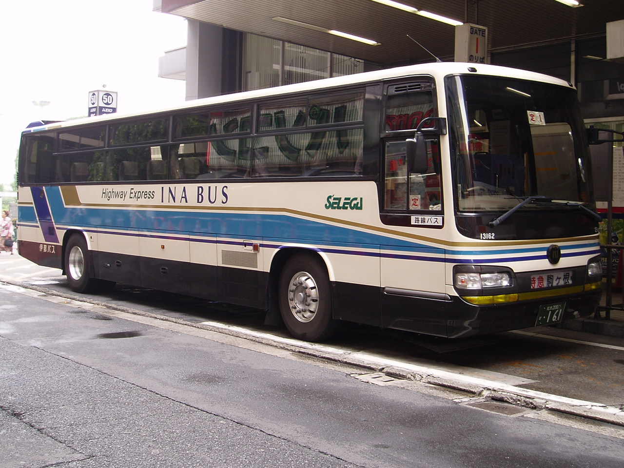 Ina Bus "Chuo Highway Bus" Hino at Shinjuku Highway Bus Taerminal